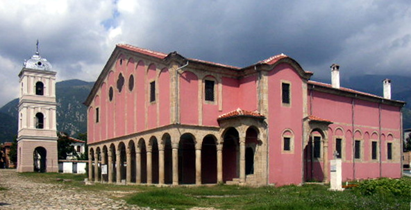 kirko de Sankta Nikolao en Karlovo (2005)